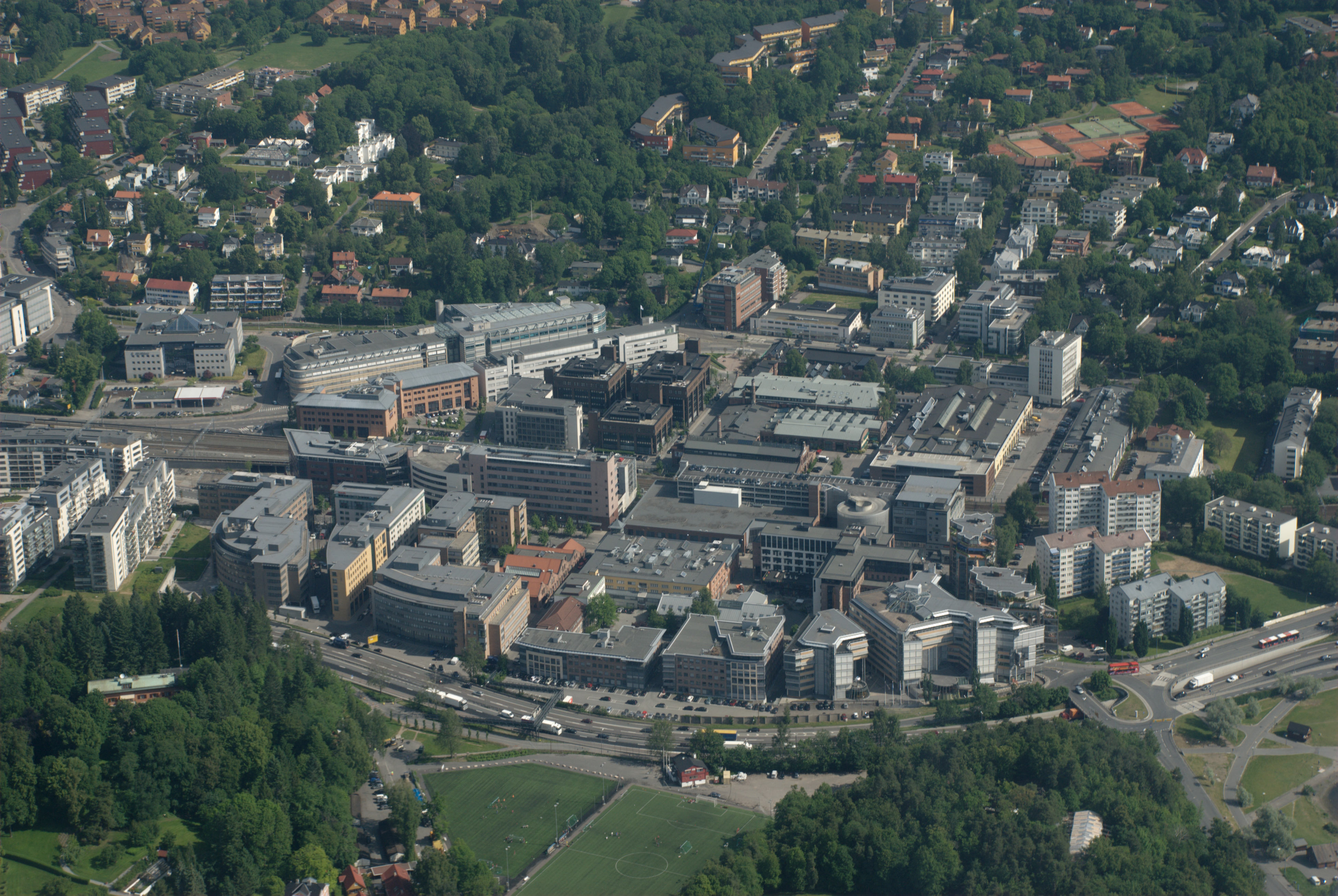 Sjølyst